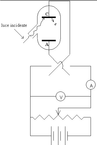 Schematizzazione dell'apparato sperimentale di Lenard per lo studio sperimentale sull'effetto fotoelettrico. Categoria:Grafici di fisica